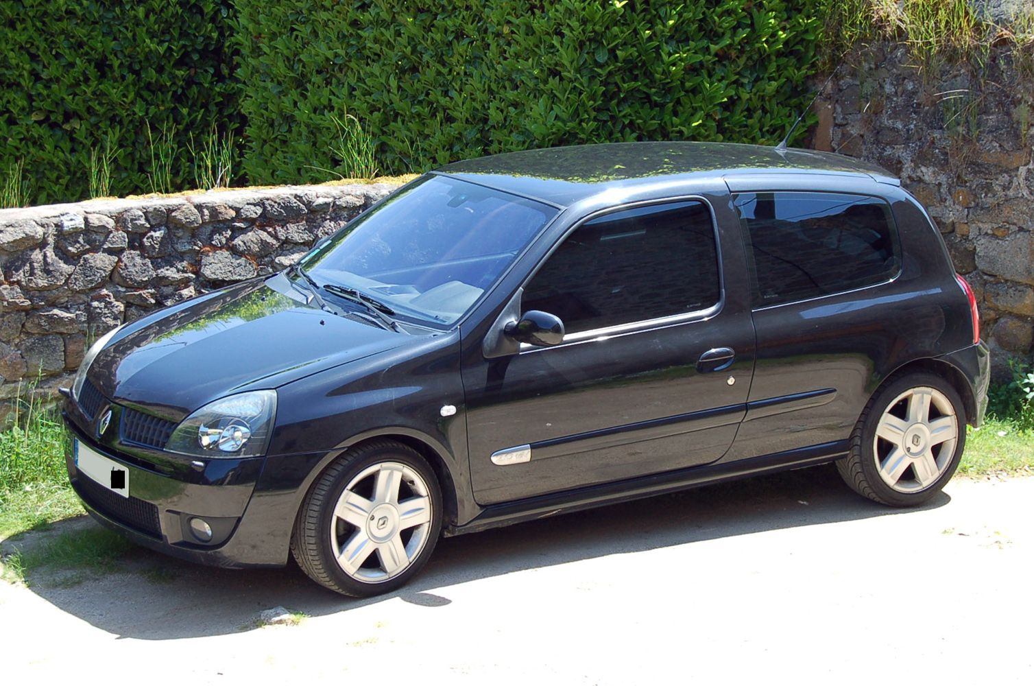 Renault Clio RS 2.2